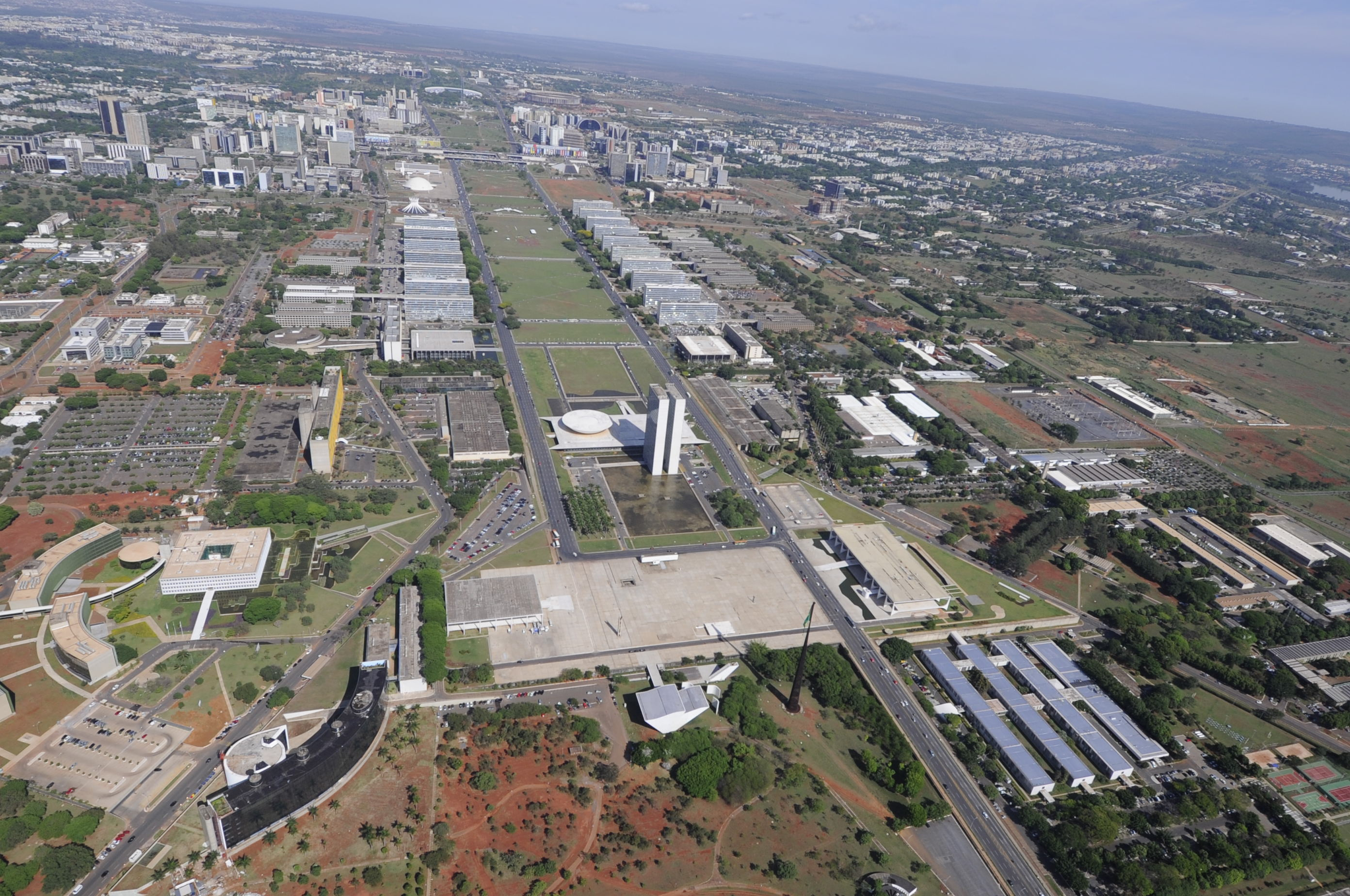 Vista aérea da Esplanada dos Ministérios em Brasília. Foto: Geraldo Magela/Agência Senado